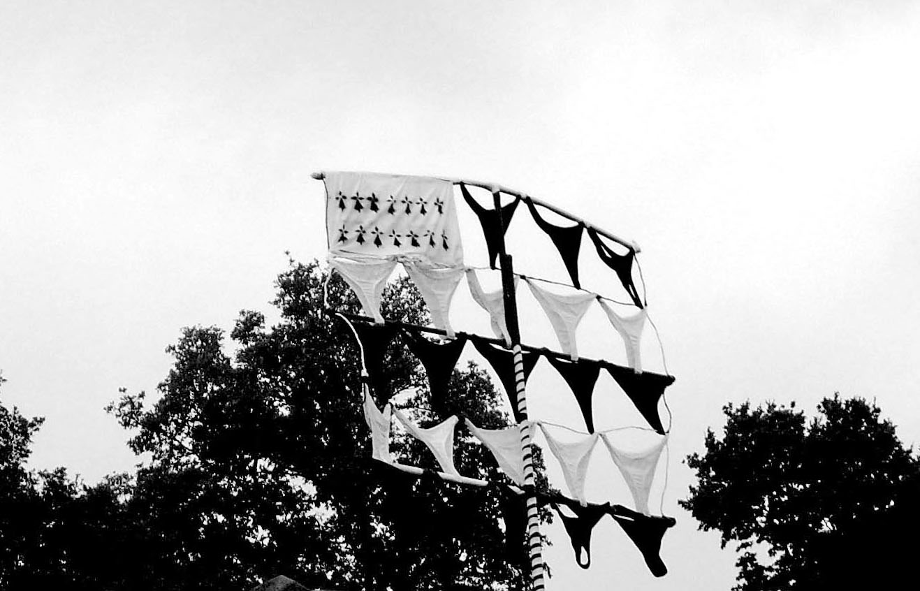 Le drapeau breton, Gwenn-ha-Du revisité chaque année pour le festival des Vieilles Charrues.